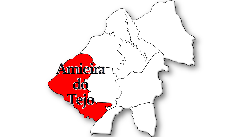 Evolução da População